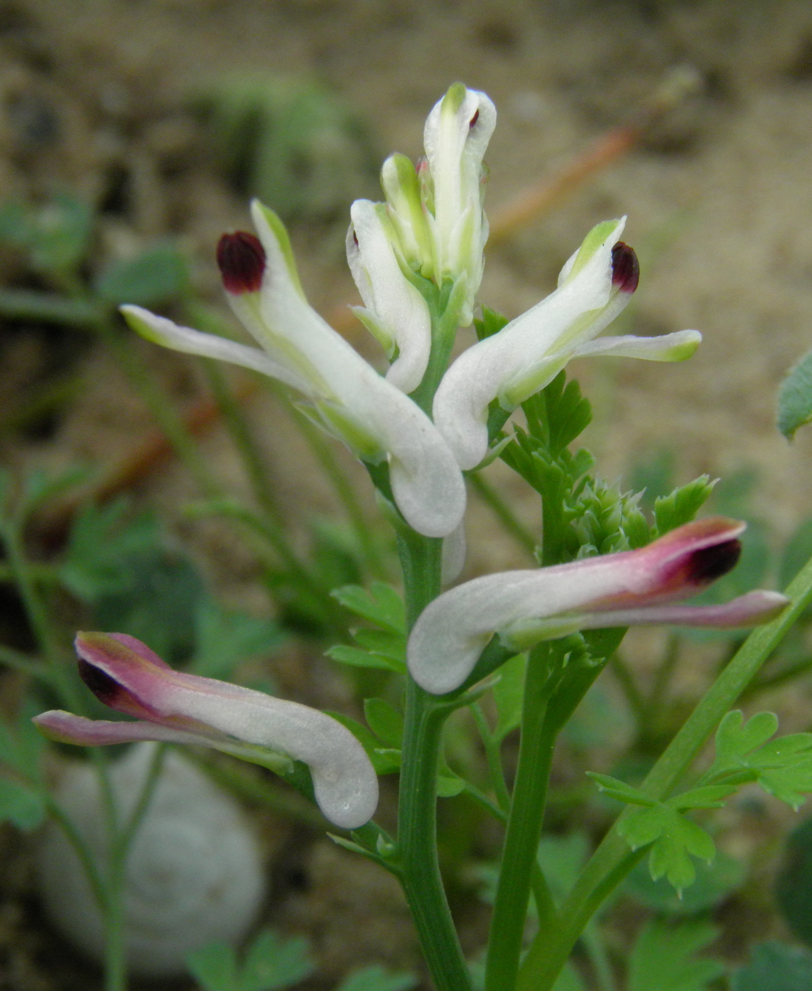 Fumaria agraria - El Palmar (Provincia de Cádiz, España)